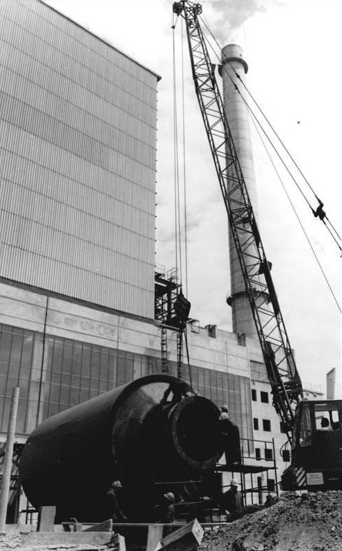 Deuna, Bau des Zementwerks ADN-ZB Ludwig-6-8-74- Bez. Erfurt: Baustelle der Integration- Zementwerk entsteht in Deuna- Spezialisten aus der VR Polen und der DDR bei Arbeiten an einem Mühlenzylinder in dem das Rohmaterial gemalen wird. Im Eichsfeldkreis Worbis, der sich mit dem Bau der Baumwollspinnerei und- Zwirnerei Leinefelde und der Entwicklung einer Reihe anderer Betrieb seit der Gründung der DDR von einem Notstandsgebiet zu einem Territorium wirtschaftlichen und gesellschaftlichen Emporstrebens entwickelt hat, wird gegenwärtig ein großes Zementwerk errichtet. Am Bau sind Spezialisten aus der UdSSR - die auch die Ausrüstung liefert - den Volksrepubliken Polen, Ungarn und Bulgarien, der CSSR und der SFRJ sowie der DDR beteiligt. Nach seiner Fertigstellung wird das Wrk jährlich 2,4 Mio Tonnen Zement liefern. Bitte auch die Motive N0806-9 u. 11 N beachten!